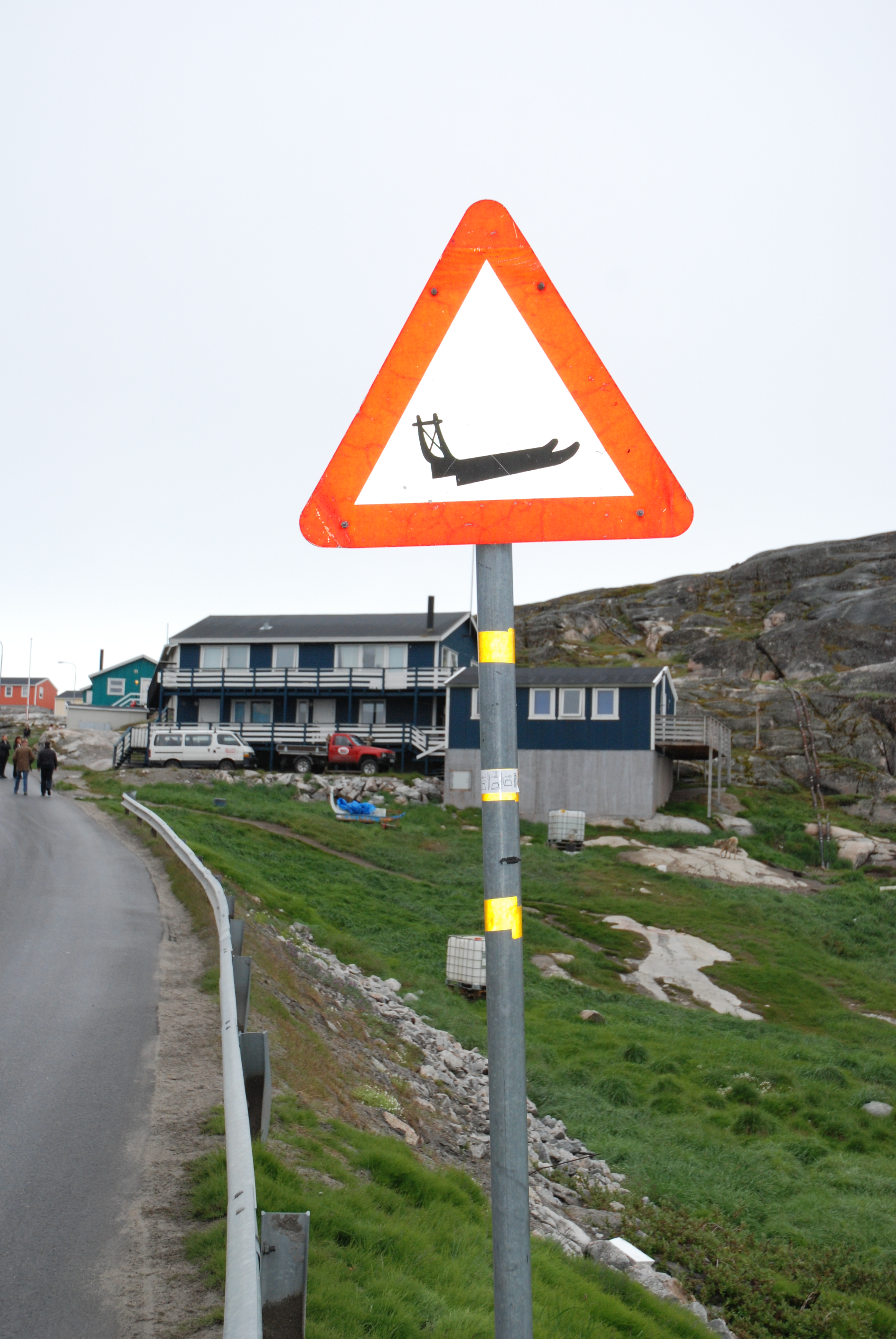 Ilulissat, Grønland.